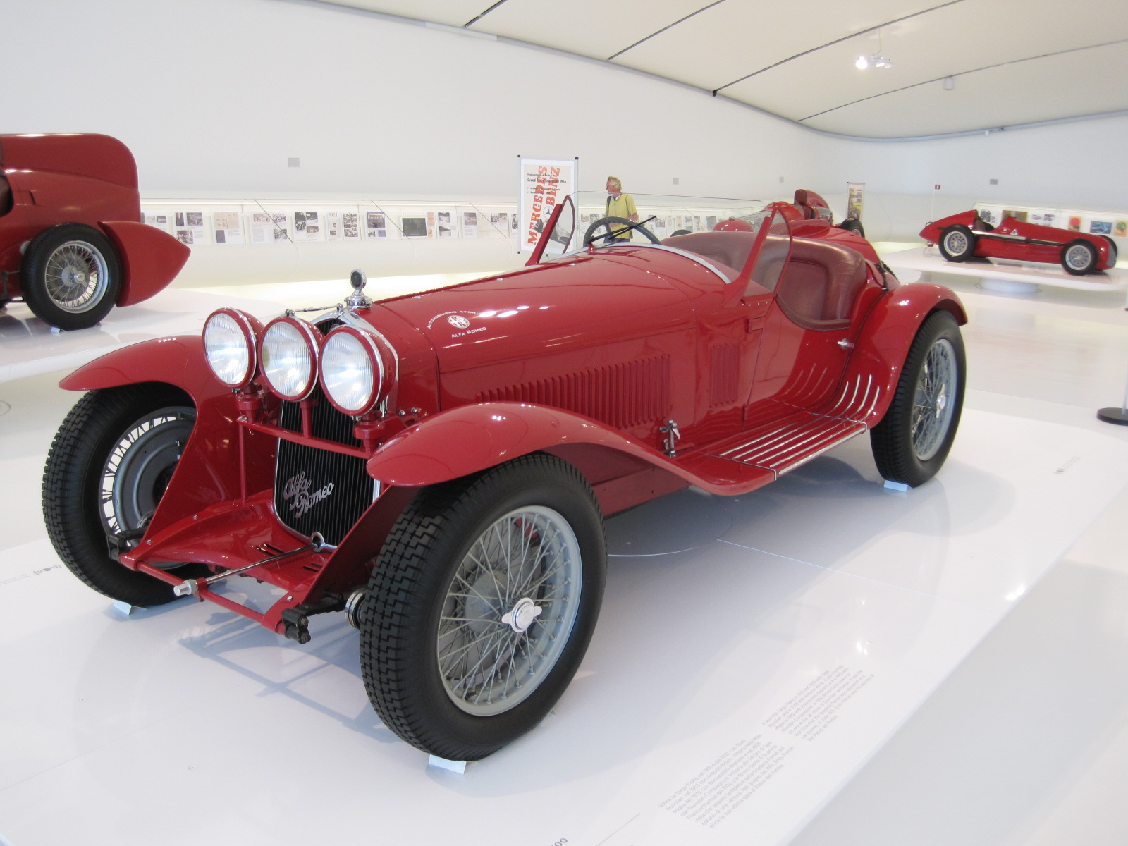 Automobiles in Enzo Ferrari Museum in Modène - Alfa Roméo 8C 2300 - Spider Corsa - 8 cylindres - 1932